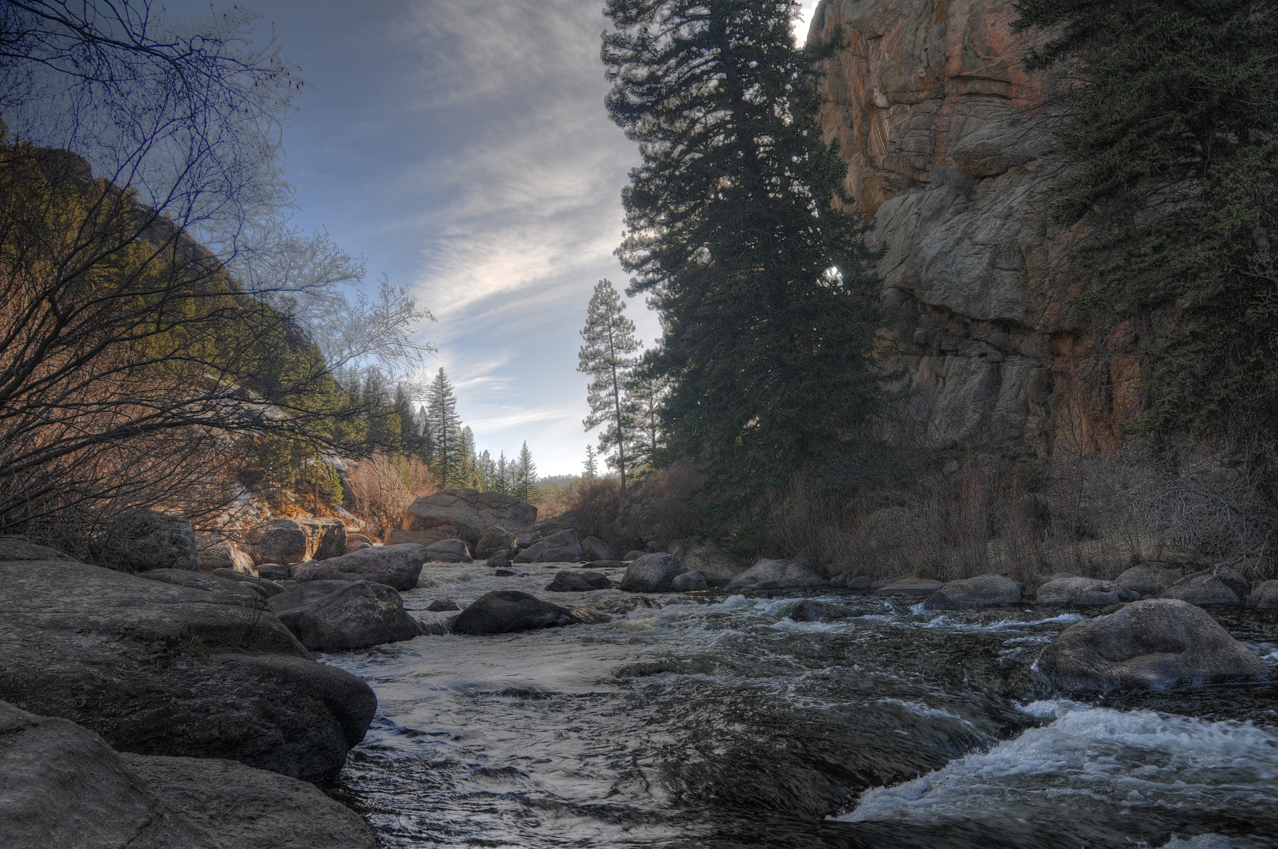 Eleven Mile Canyon